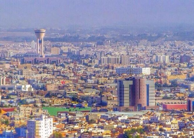 منظر عام مدينة تبوك يظهر فيه المحكمة وبرج الخزان